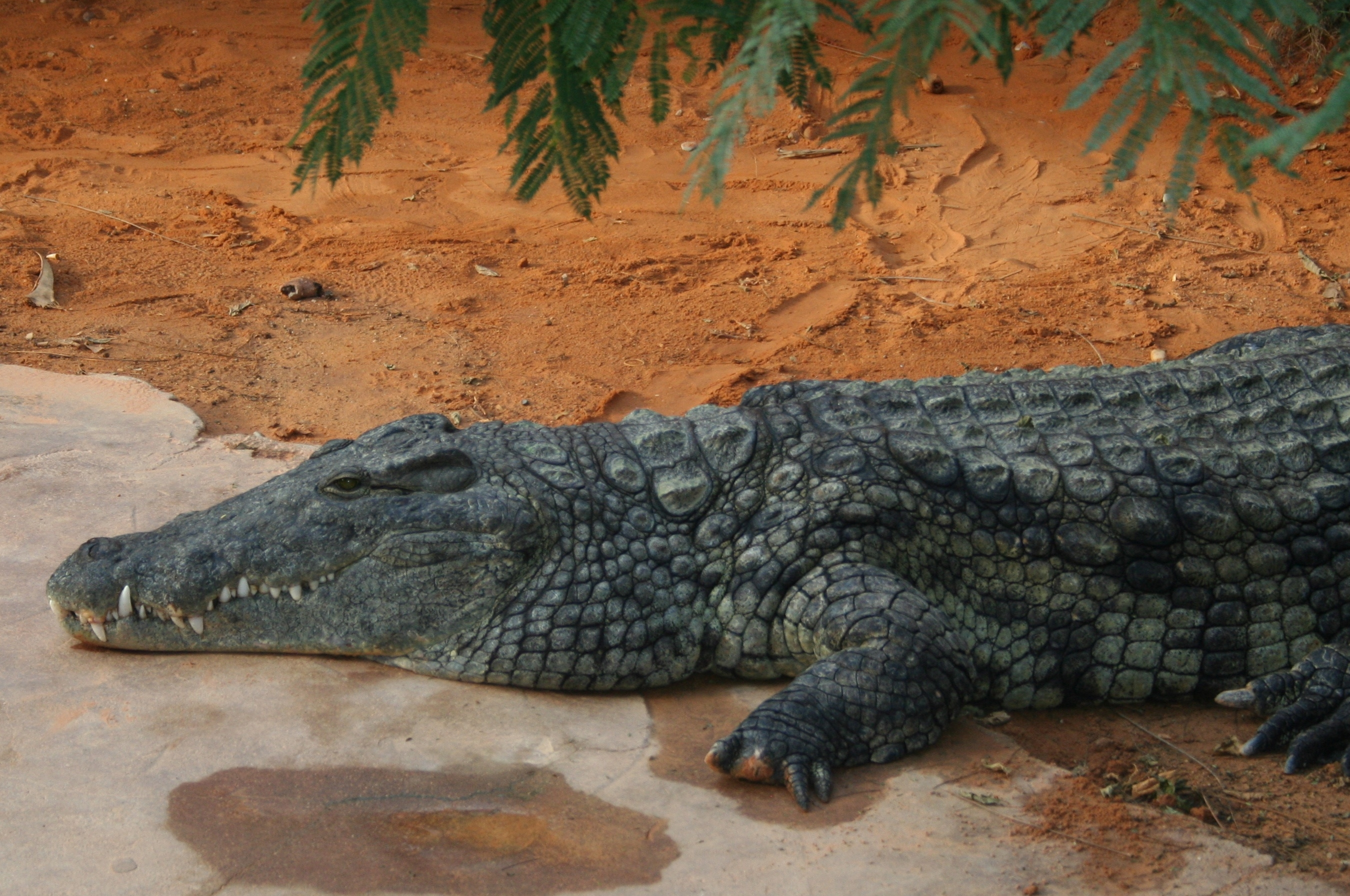 Crocodile du Nil en captivité à La Ferme aux crocodiles, Pierrelatte, France.